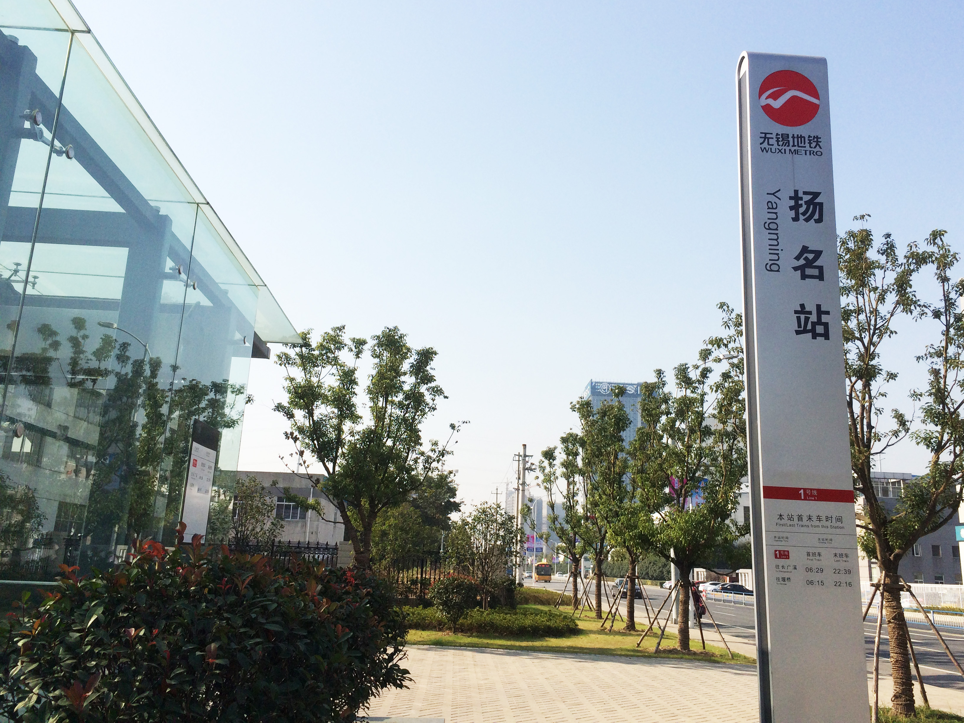 無錫地鐵揚名站